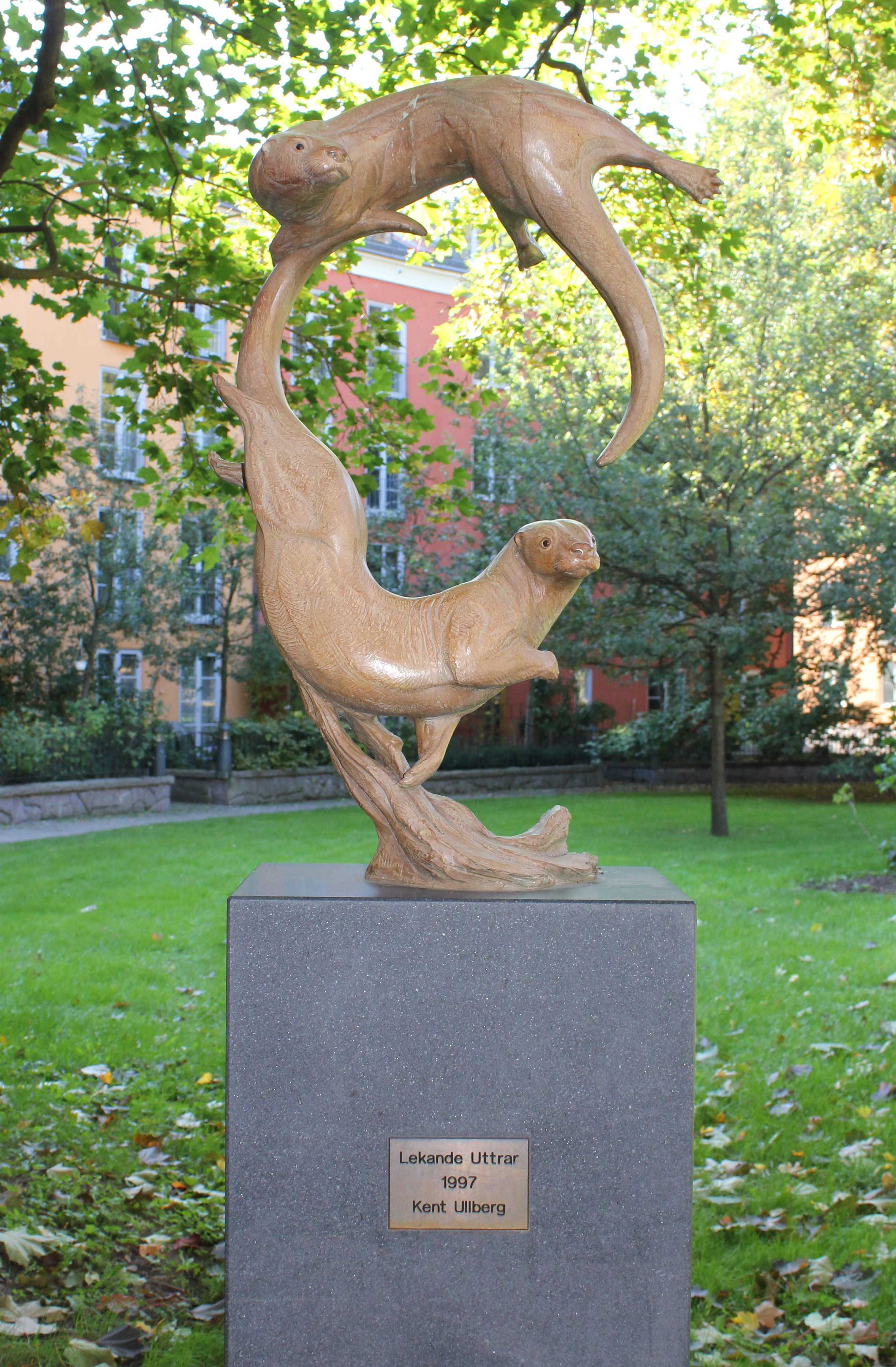 Lekande uttrar skulpterad av Kent Ullberg 1997. Rest i parken vid Grubbensringen i Sankt Eriksområdet, Kungsholmen, Stockholm.